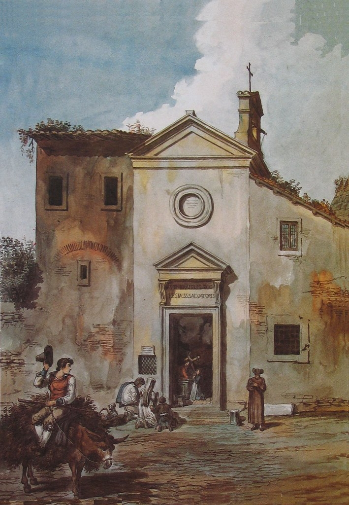 San Salvatore de Porta by Achile Pinelli